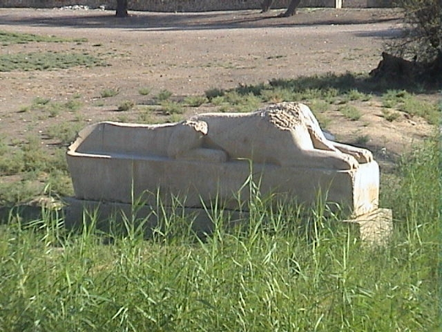 Sphinx crocodile trouvé dans les ruines du temple de millions d'années d'Amenhotep III - XVIIIe dynastie égyptienne - Kom el-Hettan - août 2004